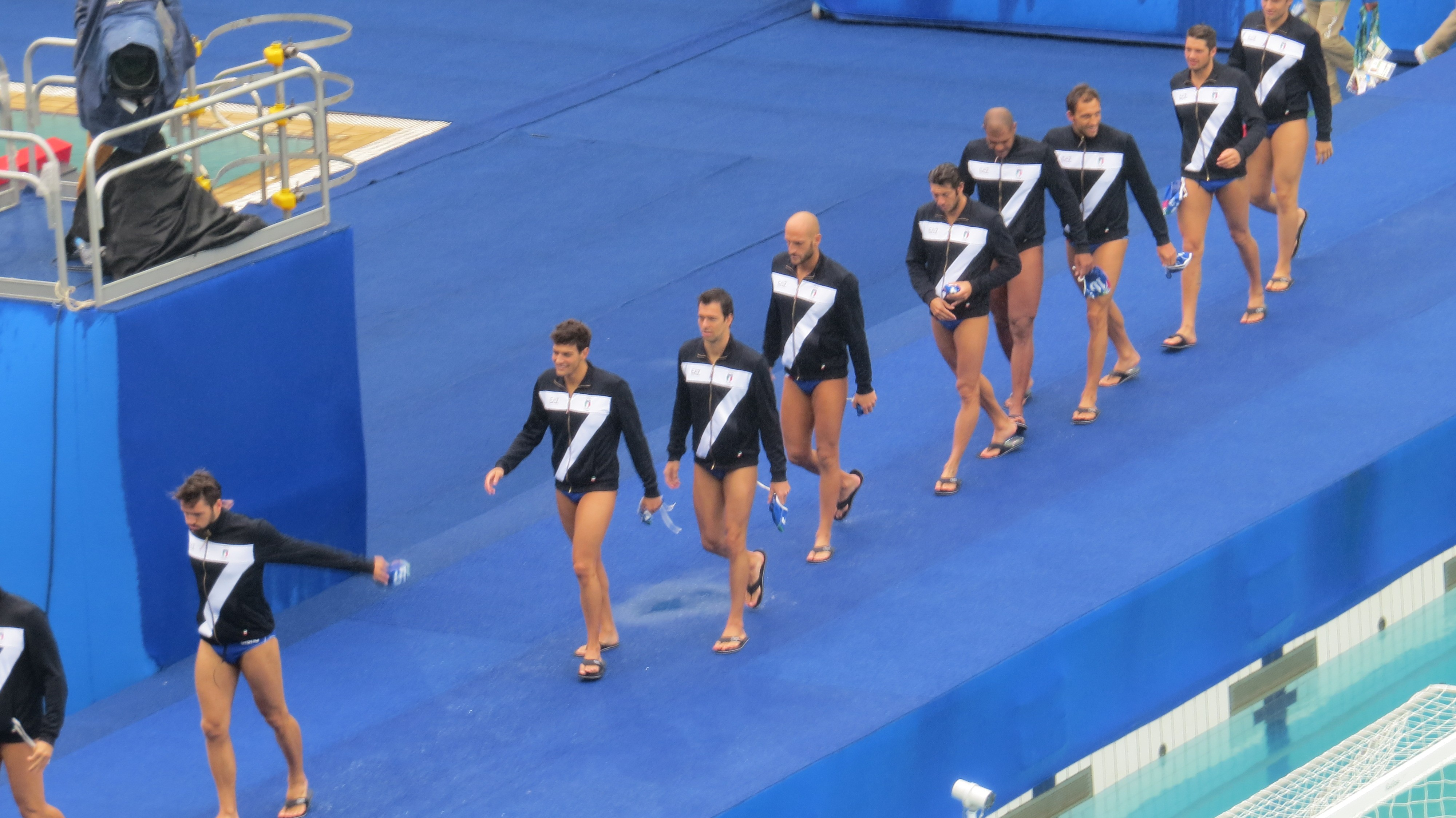 Rio 2016. Polo aquatico. sx50 104